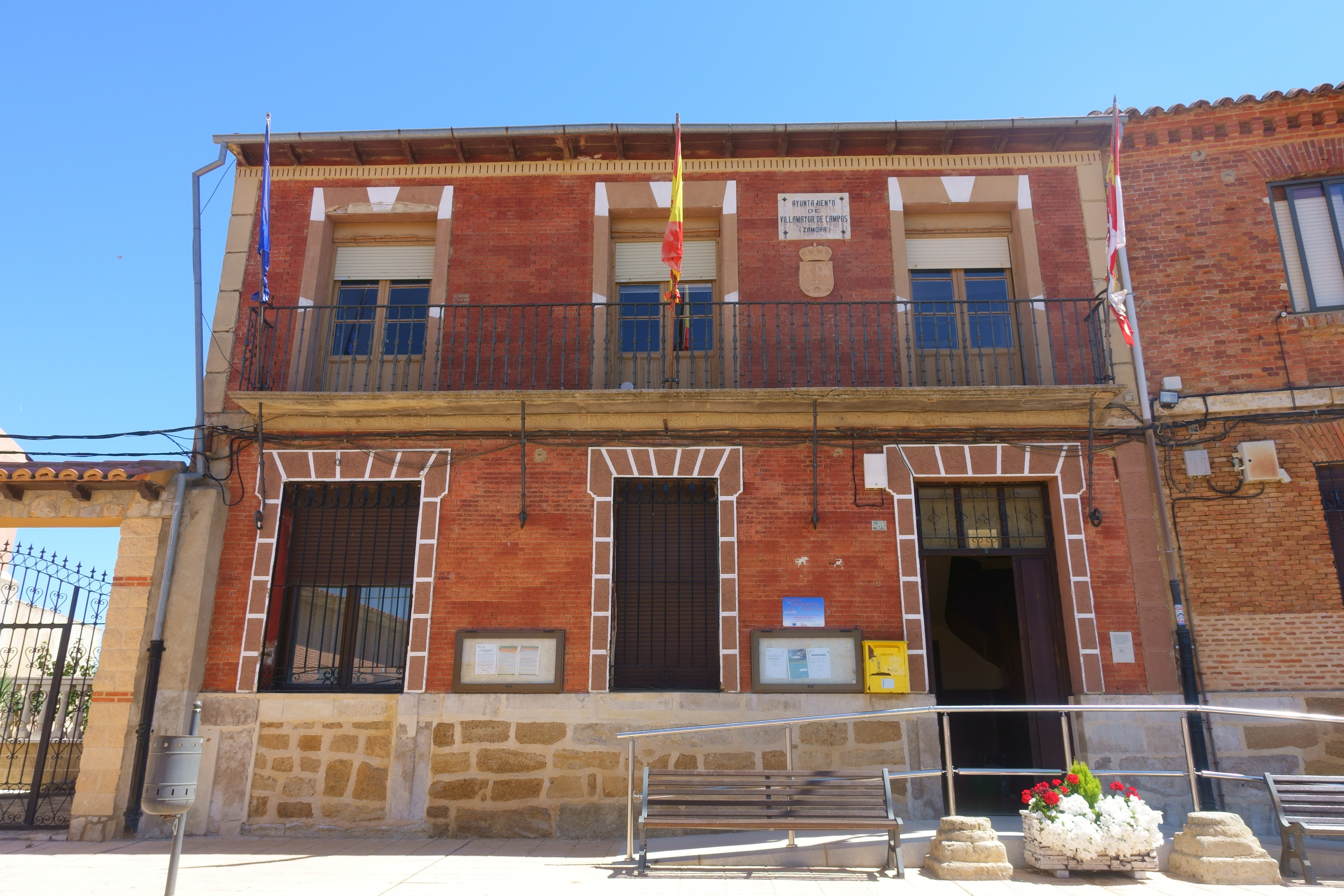 Casa consistorial de Villamayor de Campos (Zamora, España).